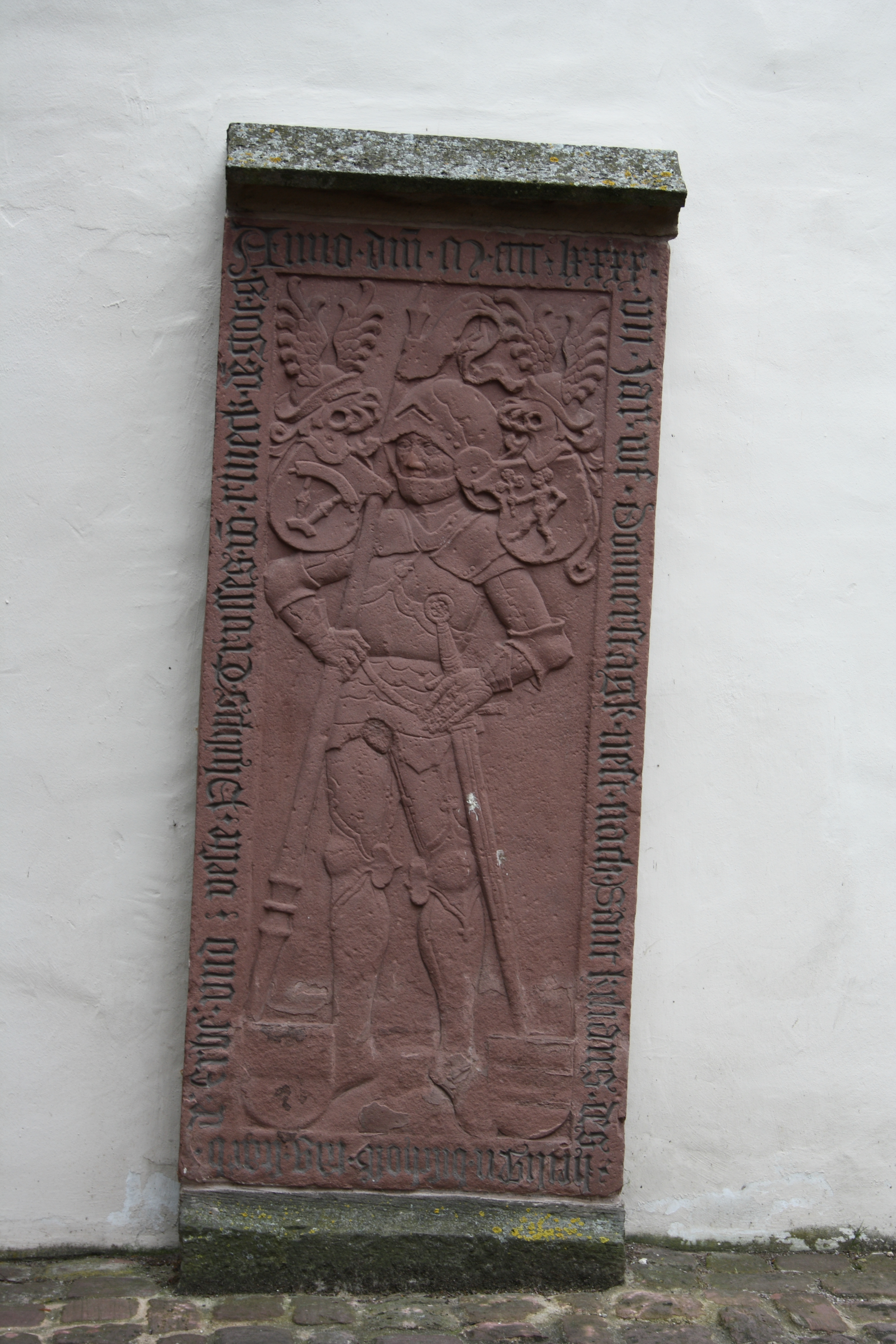 katholische Pfarrkirche St. Michael in Lohr am Main im Landkreis Main-Spessart (Bayern)